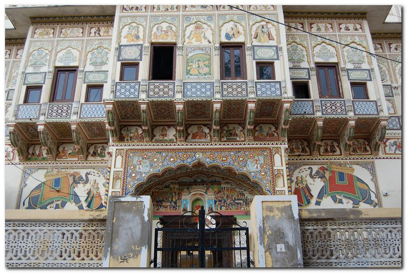 Haveli, Mandawa, India